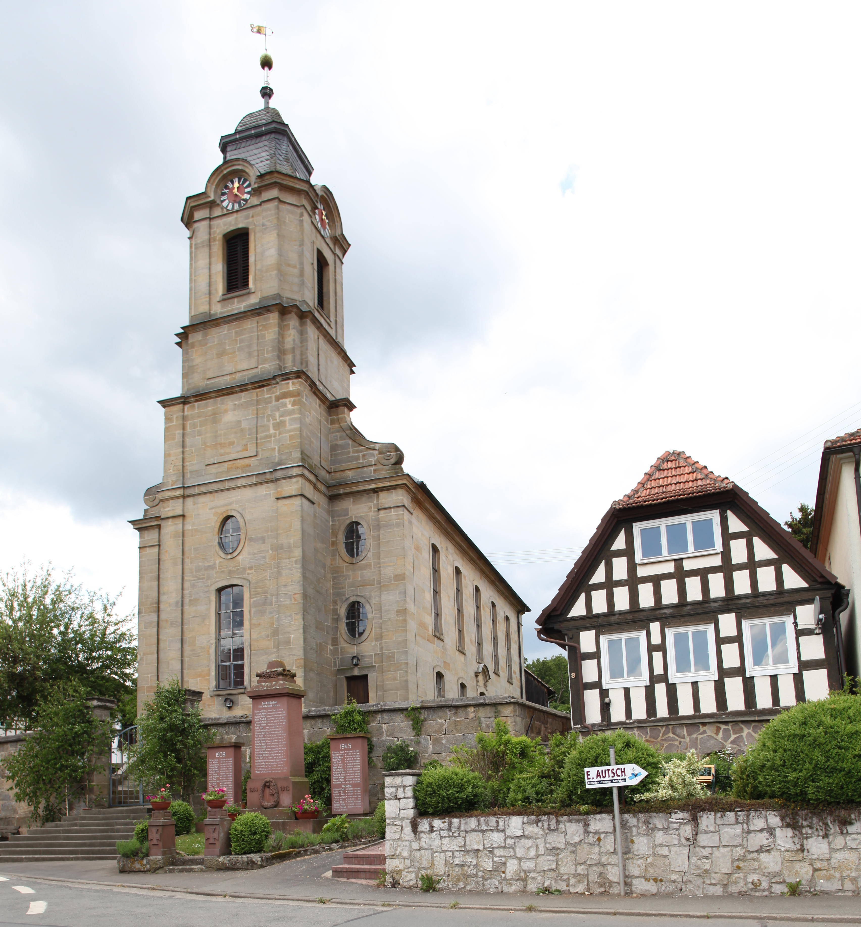 Evang.-Luth. Pfarrkirche, Heilgersdorf, Landkreis Coburg